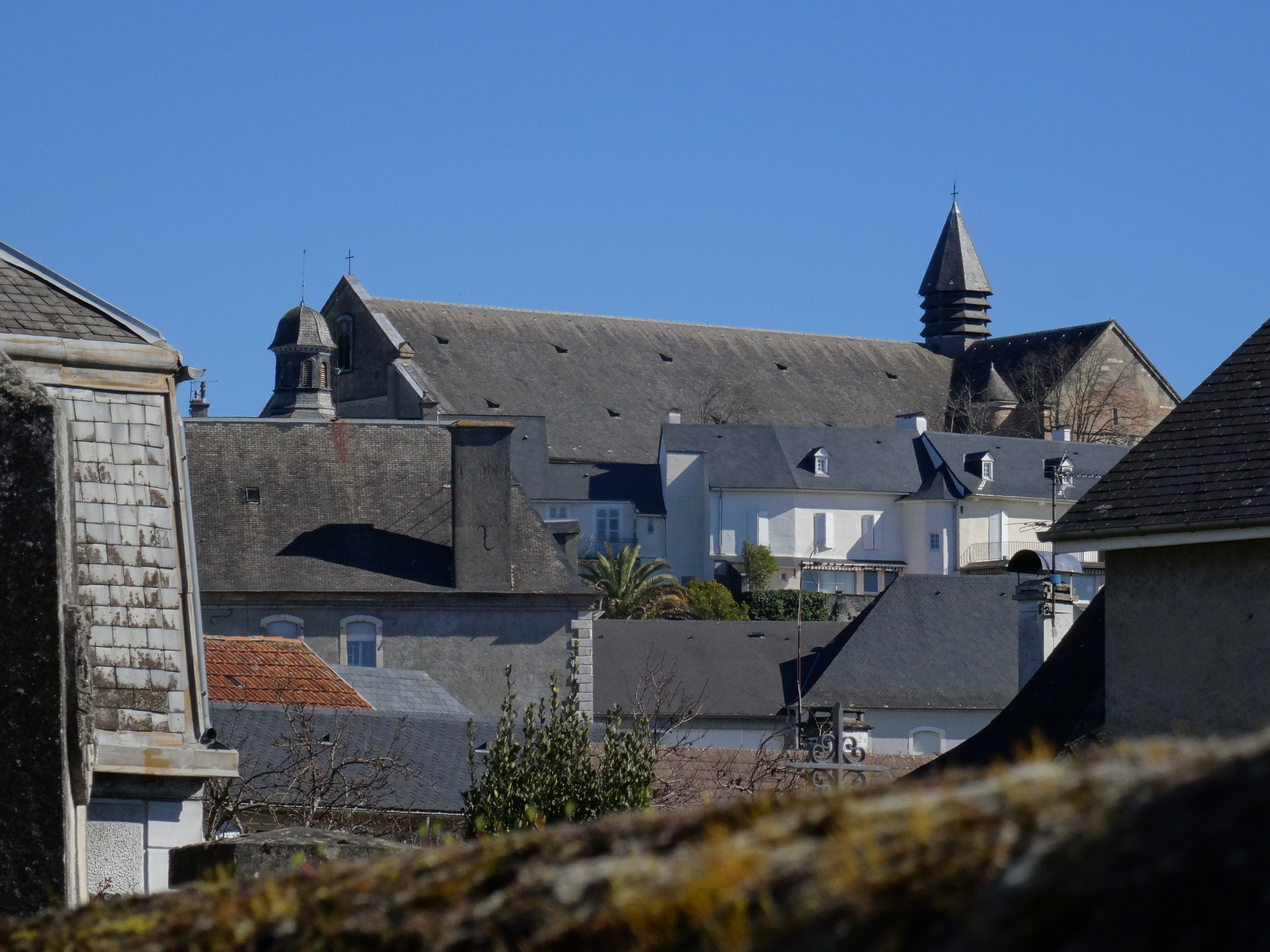 Toits de Lescar, avec au fond la cathédrale